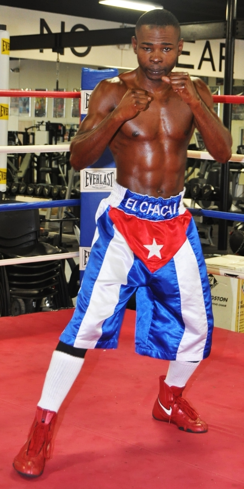 Guillermo Rigondeaux en su campo de entrenamientos de Florida